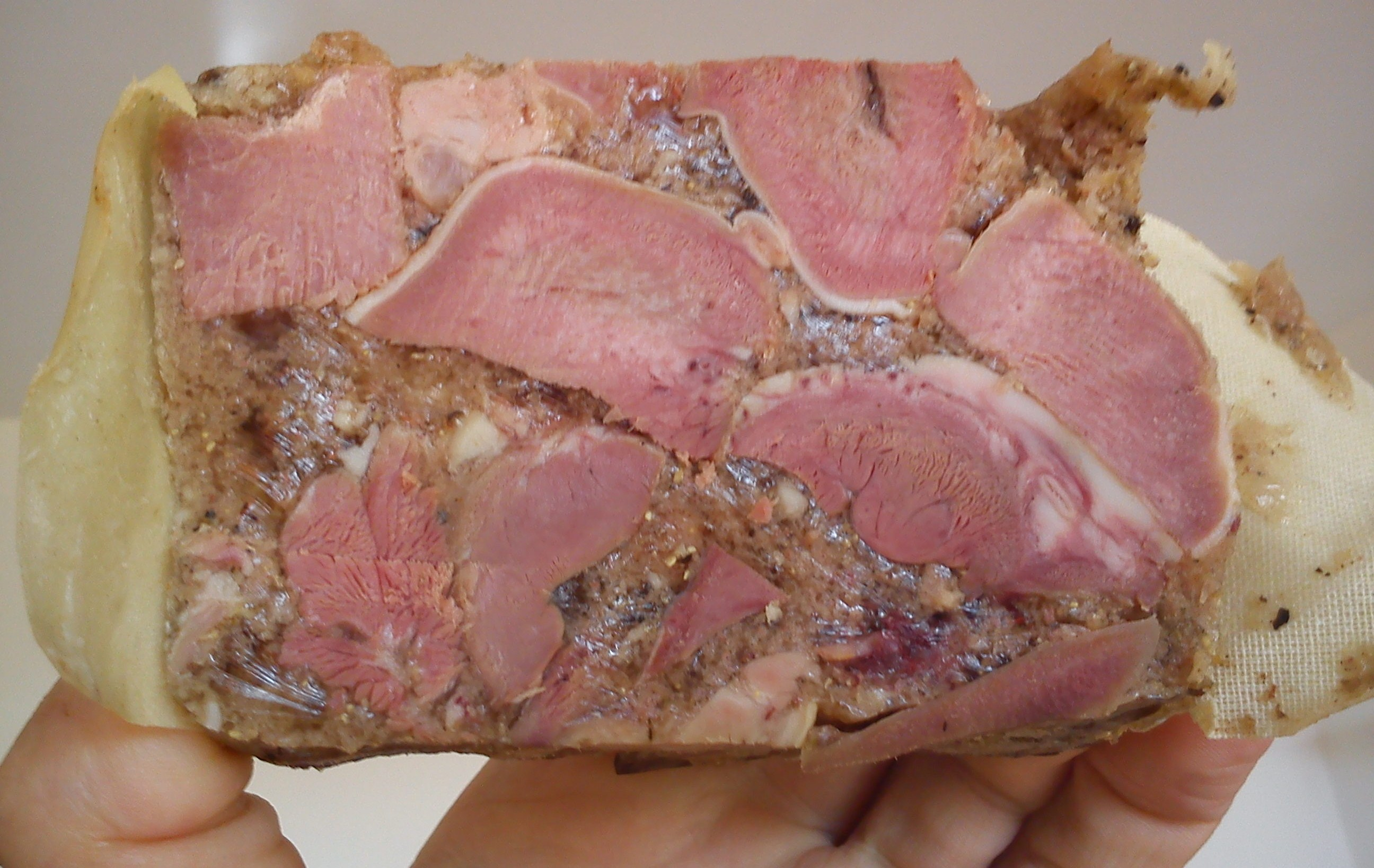 Salceson z Poznania.